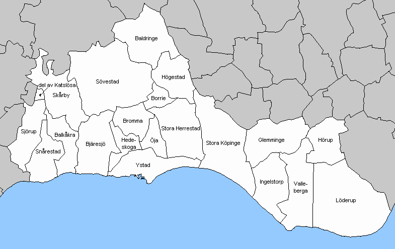 socken in Ystad